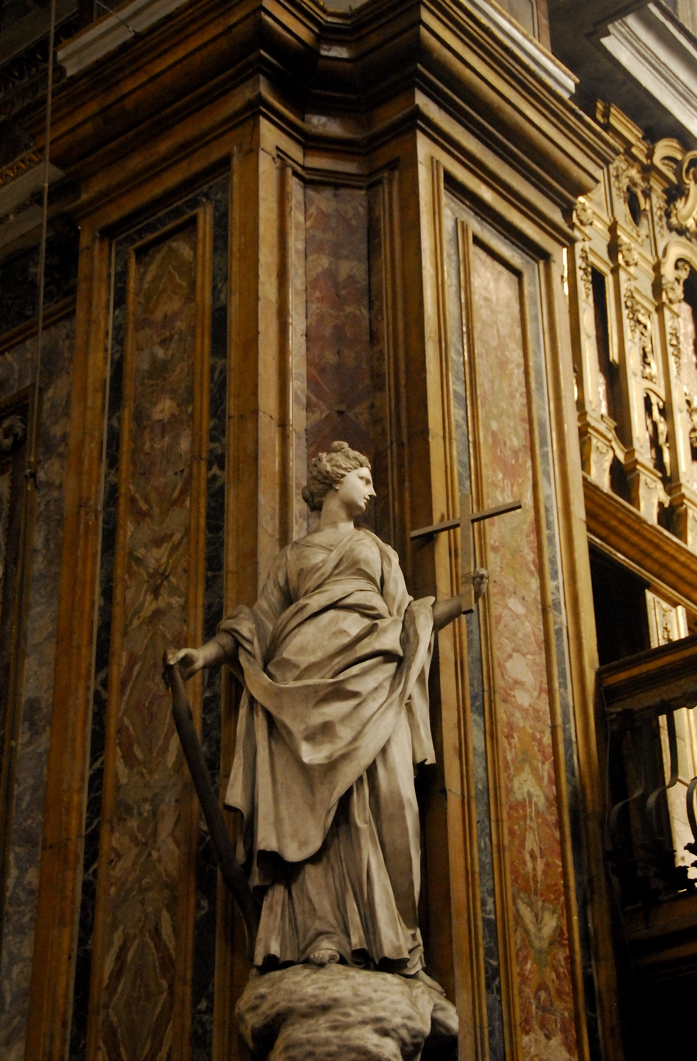 Palermo, ITA